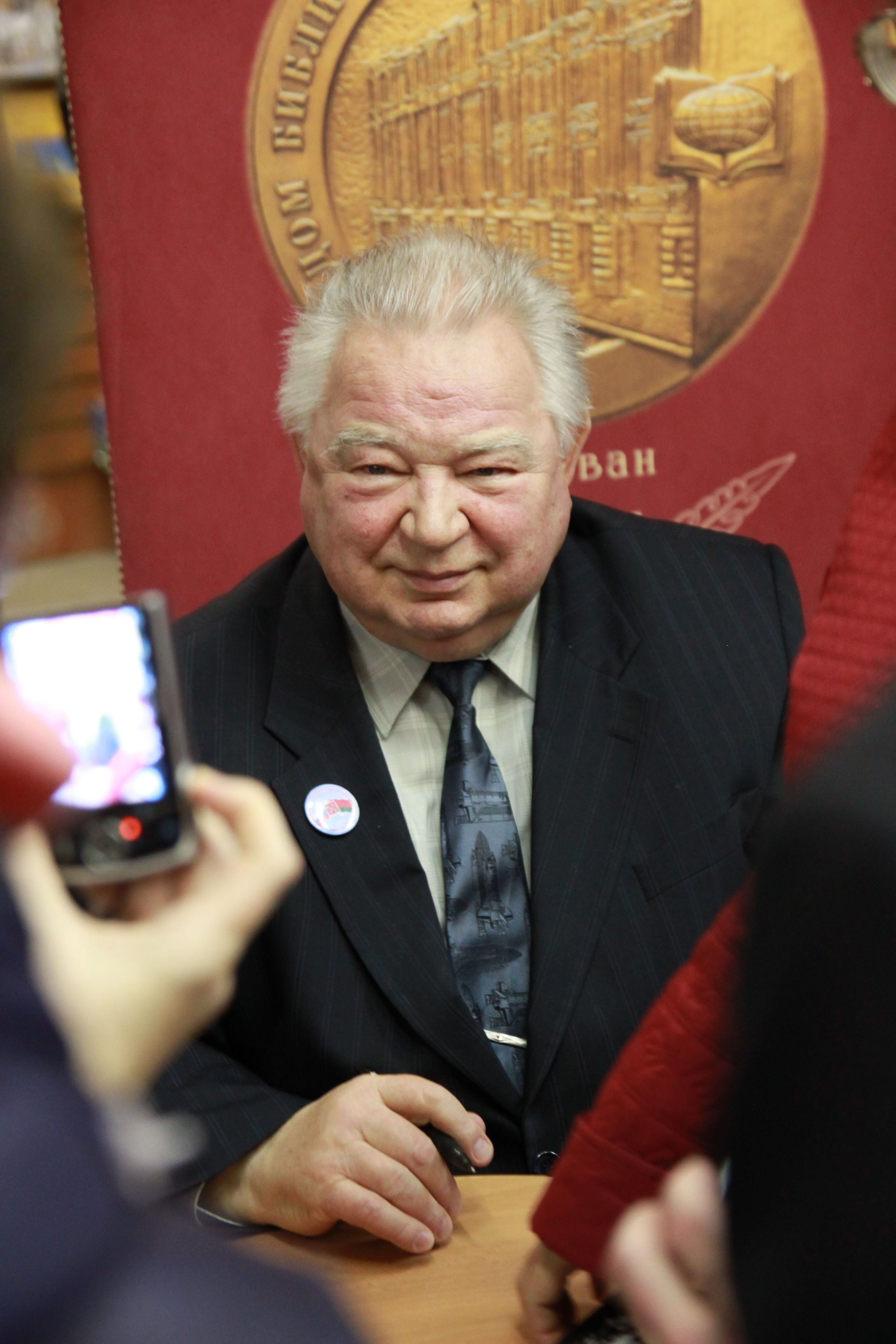 Георгий Гречко на презентации книги "Космонавт №34. От лучины до пришельцев"